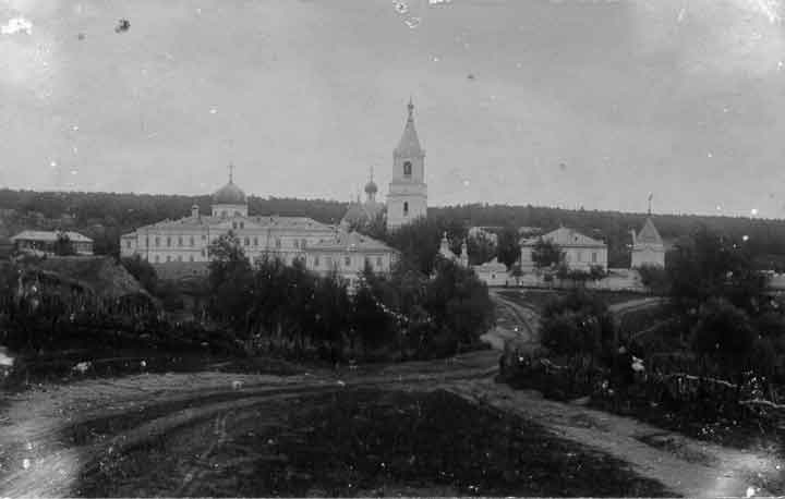 Kerensk monastery